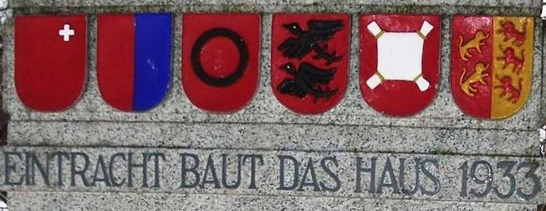 Bezirkswappen des Kanton Schwyz, Brunnen beim Alten Schulhaus in Einsiedeln (1933), Erinnerung an die Kantonsteilung von 1831-1833.